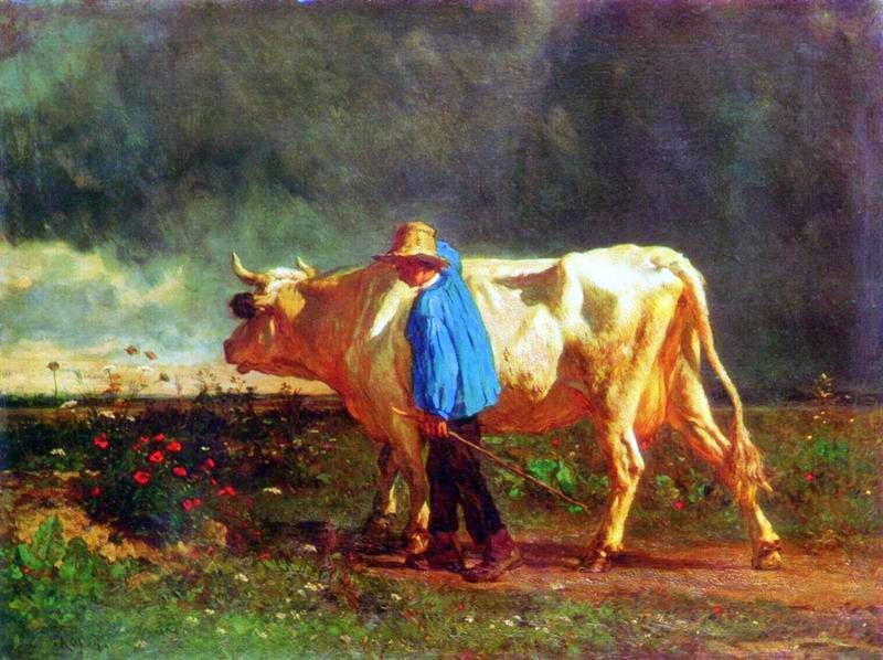 Constant Troyon (1810-1865): Der Kuhirt